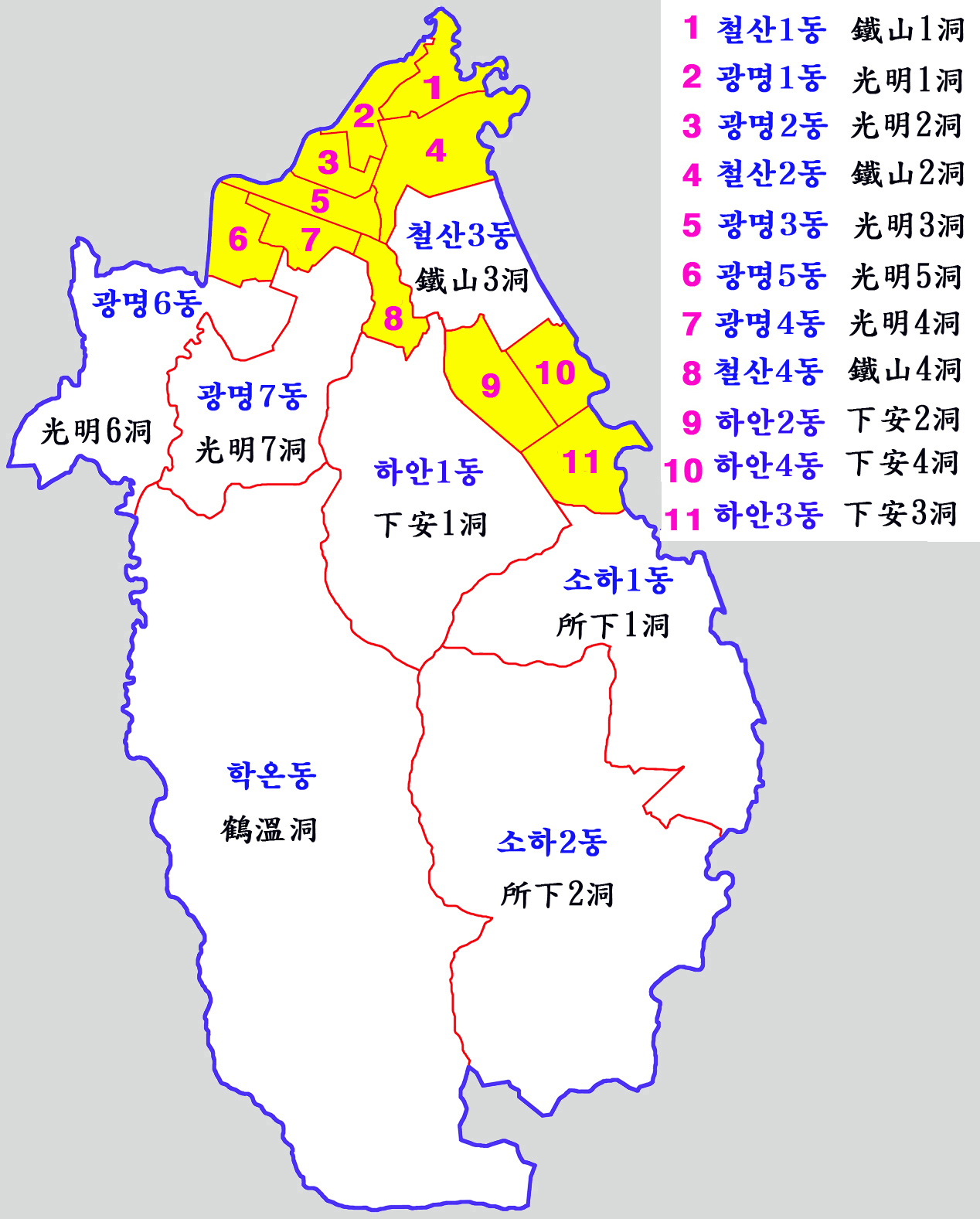 광명시 행정구역도